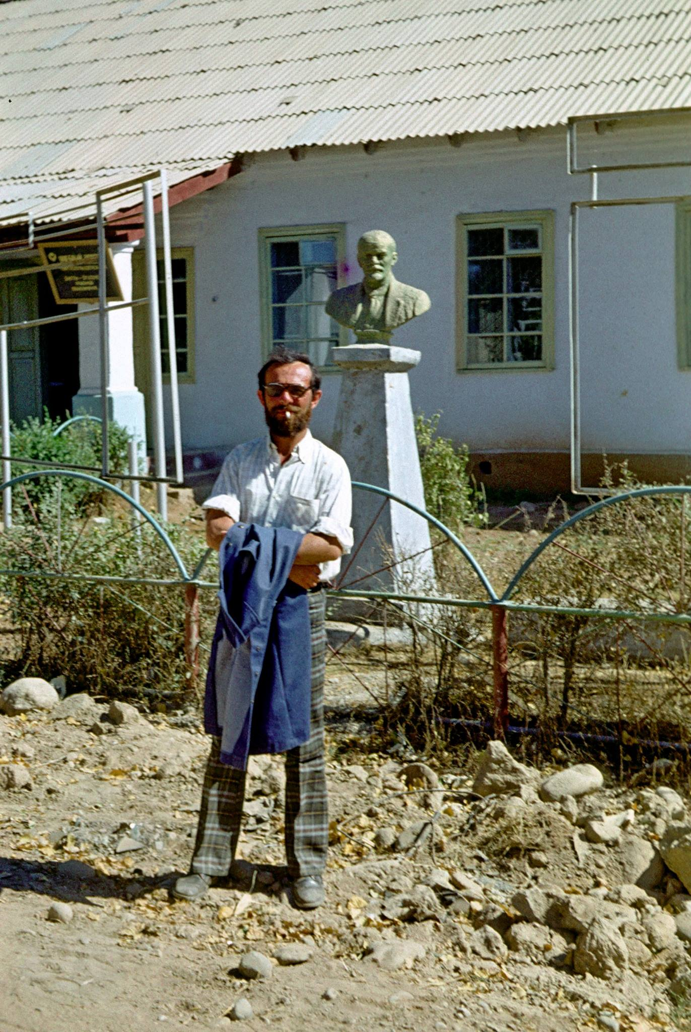 Соломон Львович Перешкольник в селе Покровка, Киргизская ССР.